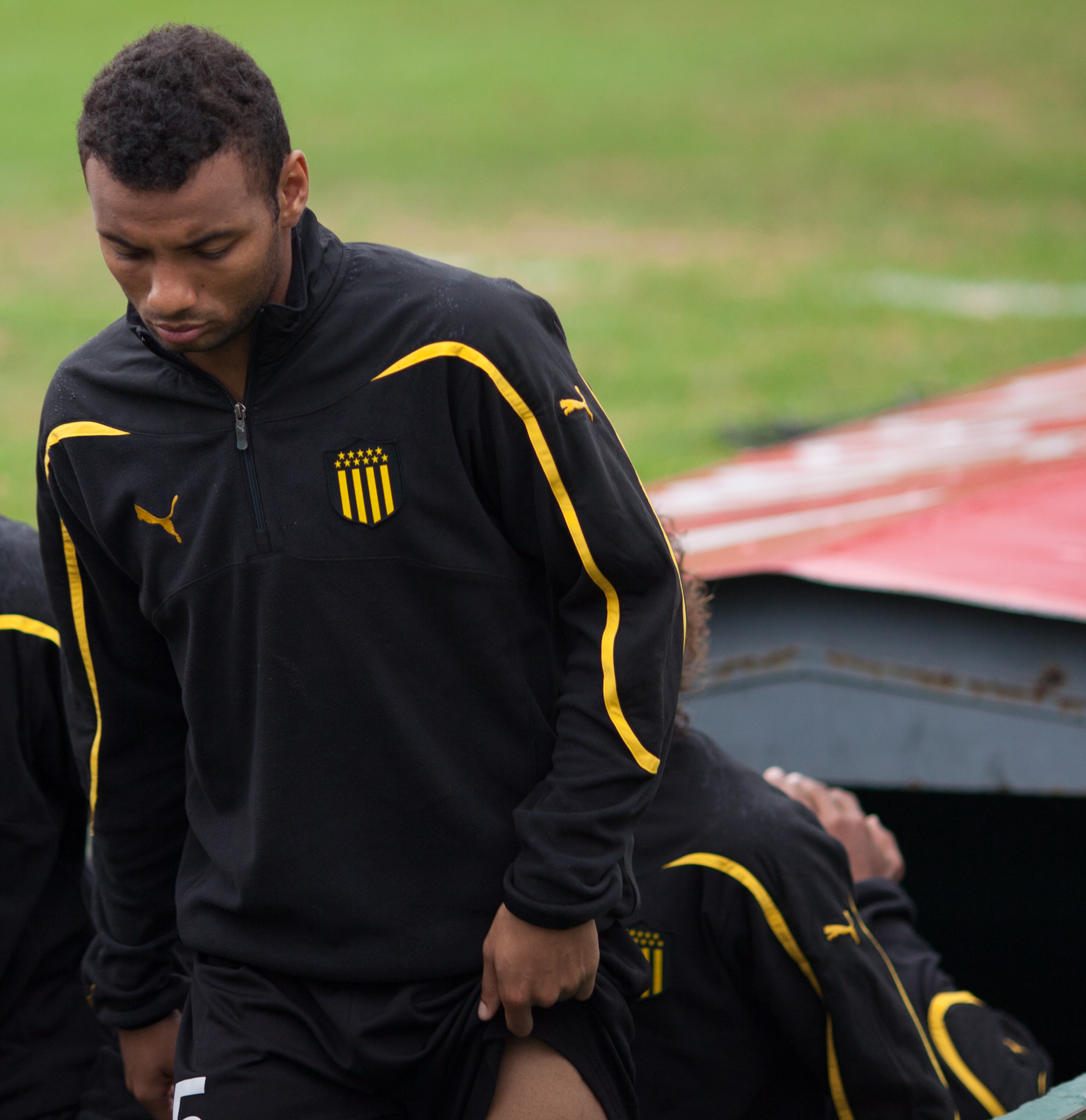 João Pedro playing for Penarol.